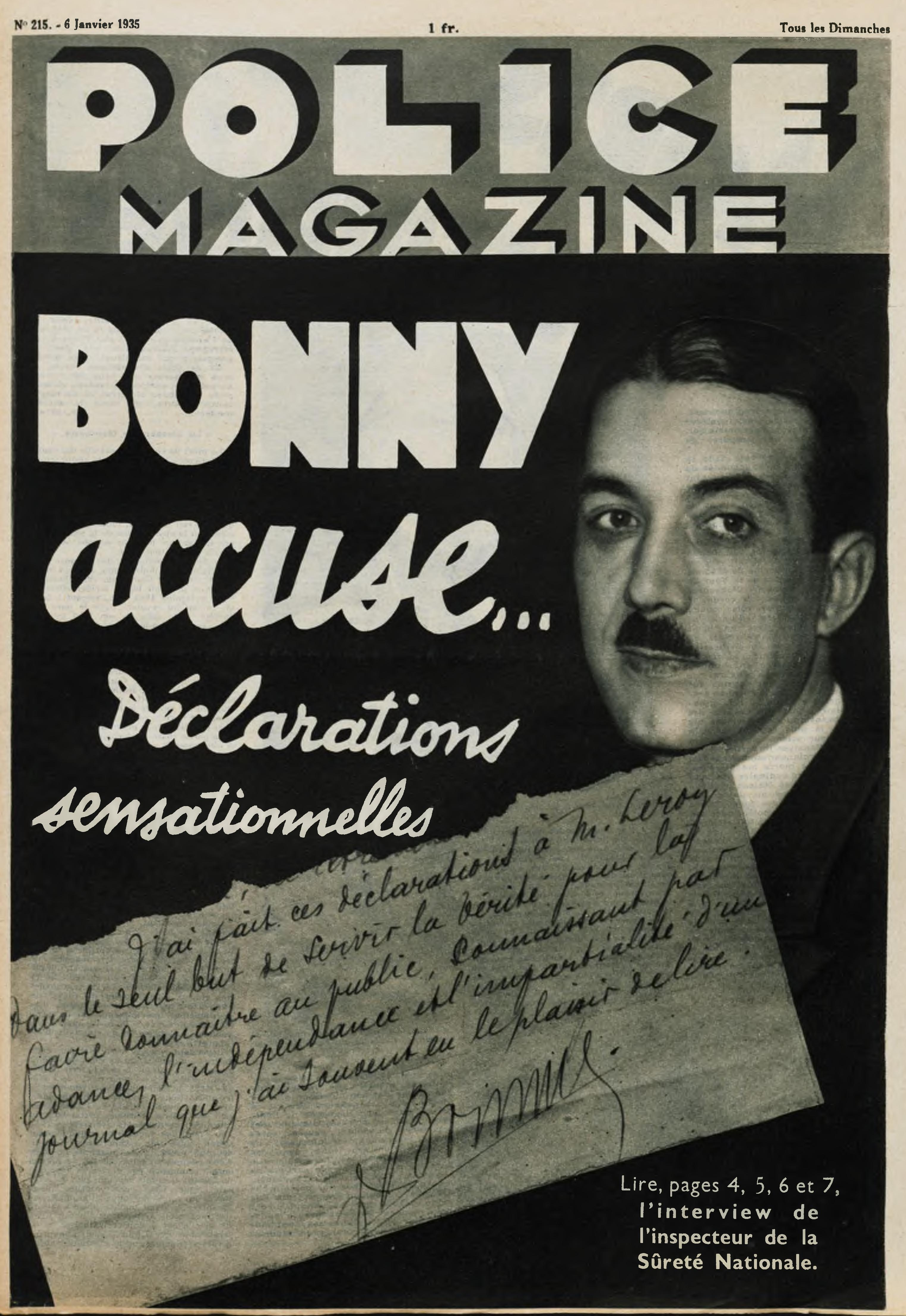 Pierre Bonny à la une de Police Magazine, le 6 janvier 1935, alors qu'il est lui-même accusé d'extorsion de fonds et de corruption de fonctionnaire.